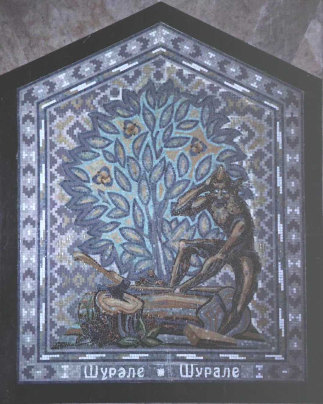 ШуралеТатарча/tatarça: ШүрәлеБашҡортса: Шүрәле